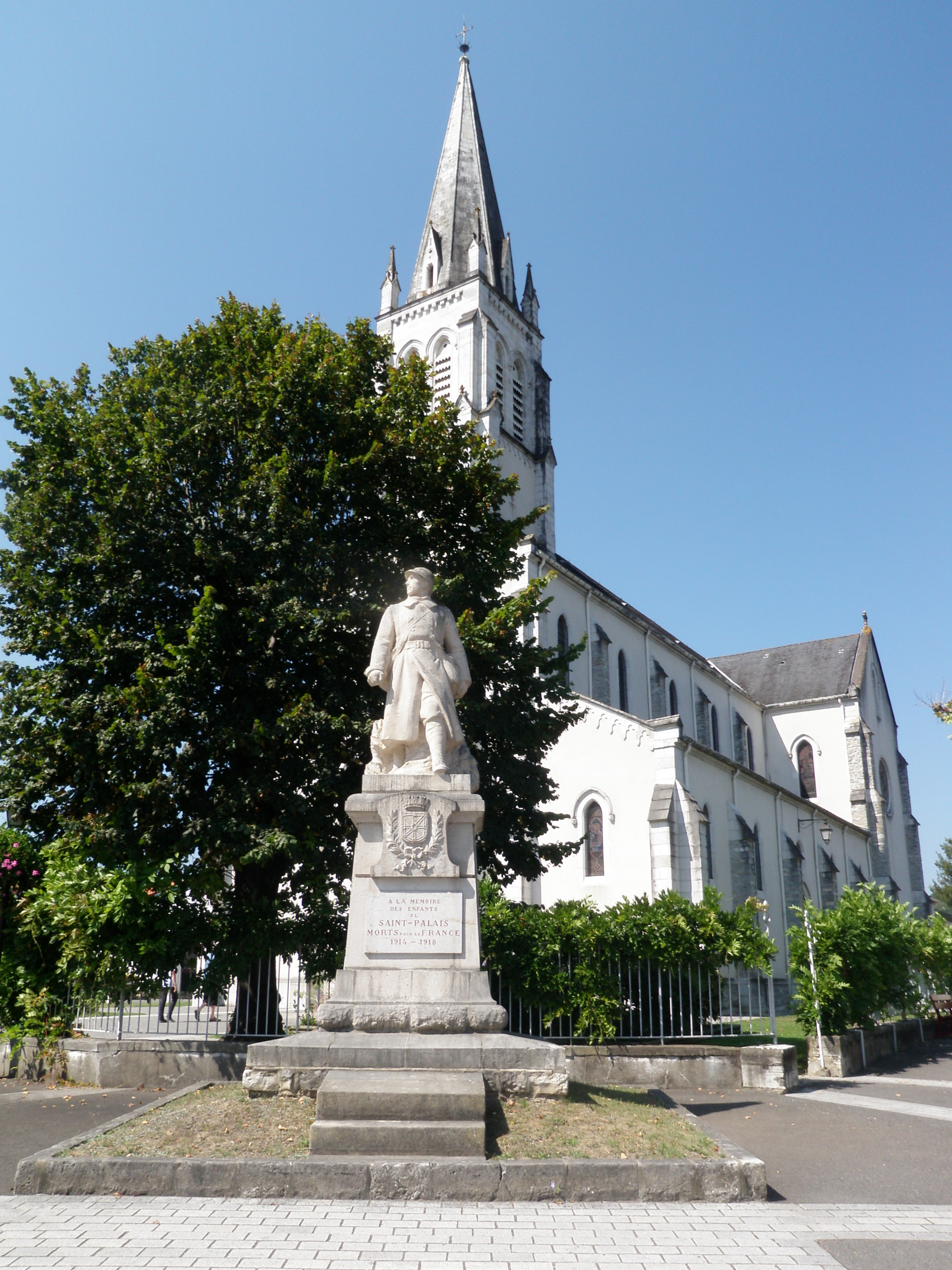 Saint Palais, Pays basque